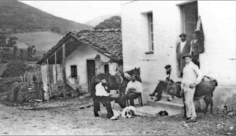 Pottoka eta artzanora, Urtoko mendatean. Tudurin 1898. urtean